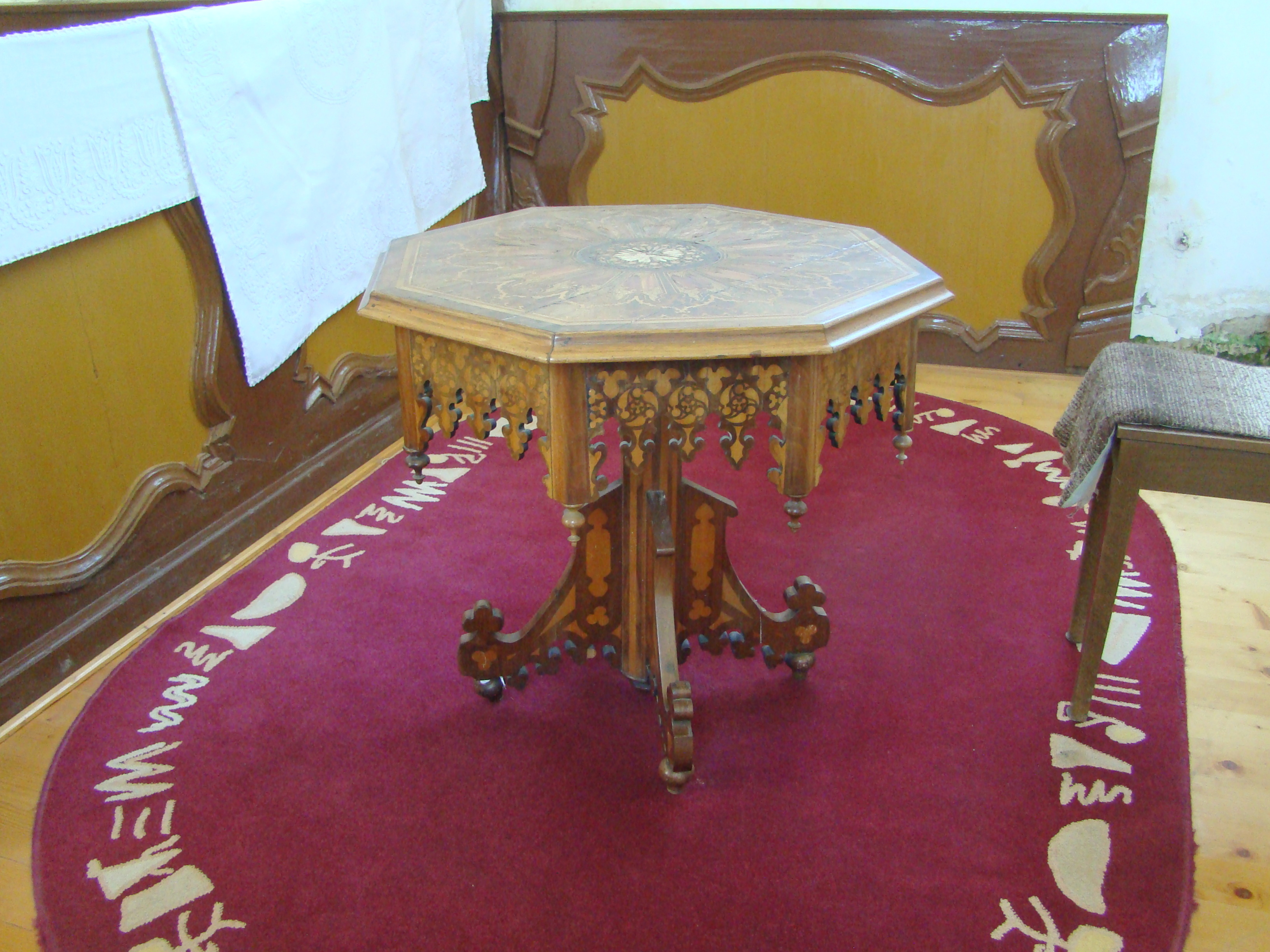 Biserica reformată, sat Păcureni; comuna Glodeni